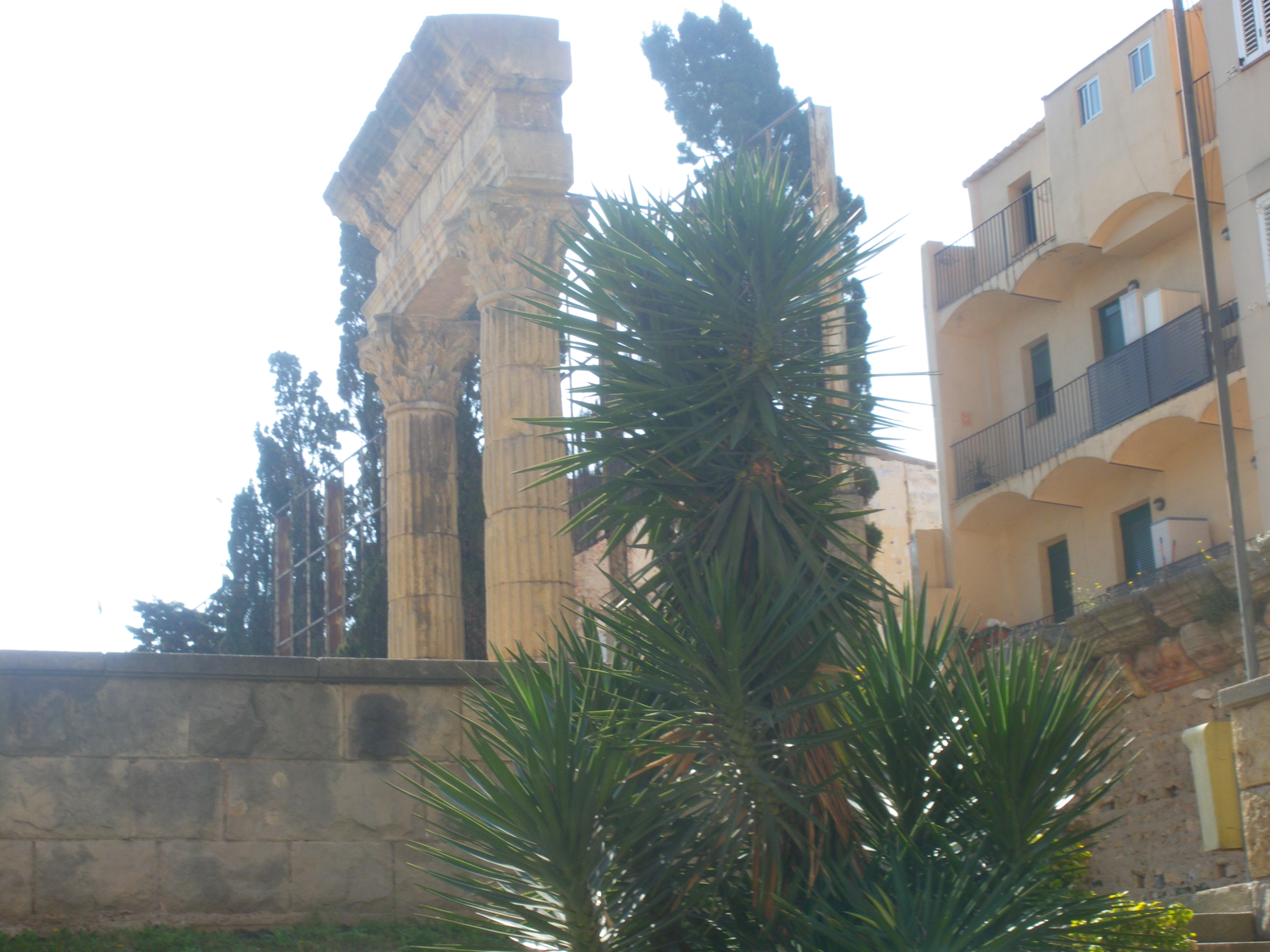 Dues columnes del Fòrum de la Colònia de Tarragona amb capitell.